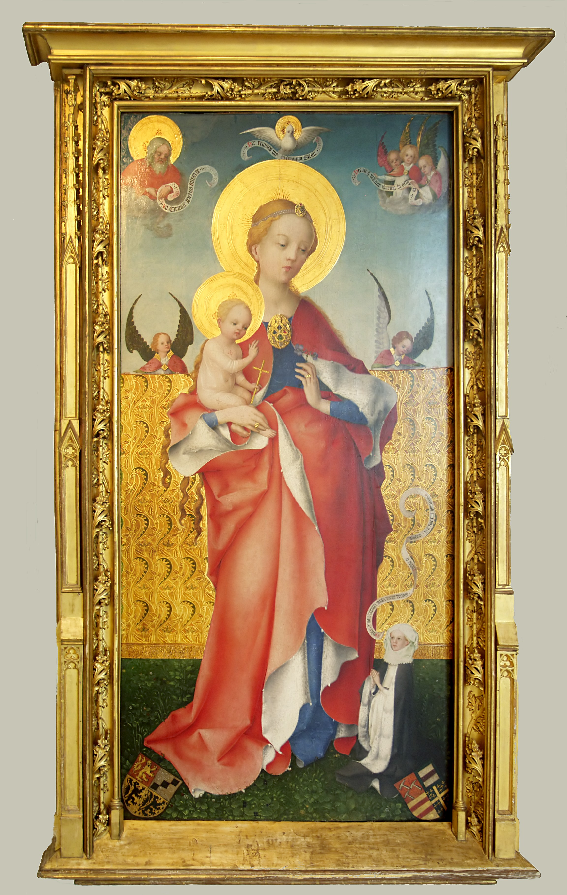 Madonne mit dem Veilchen